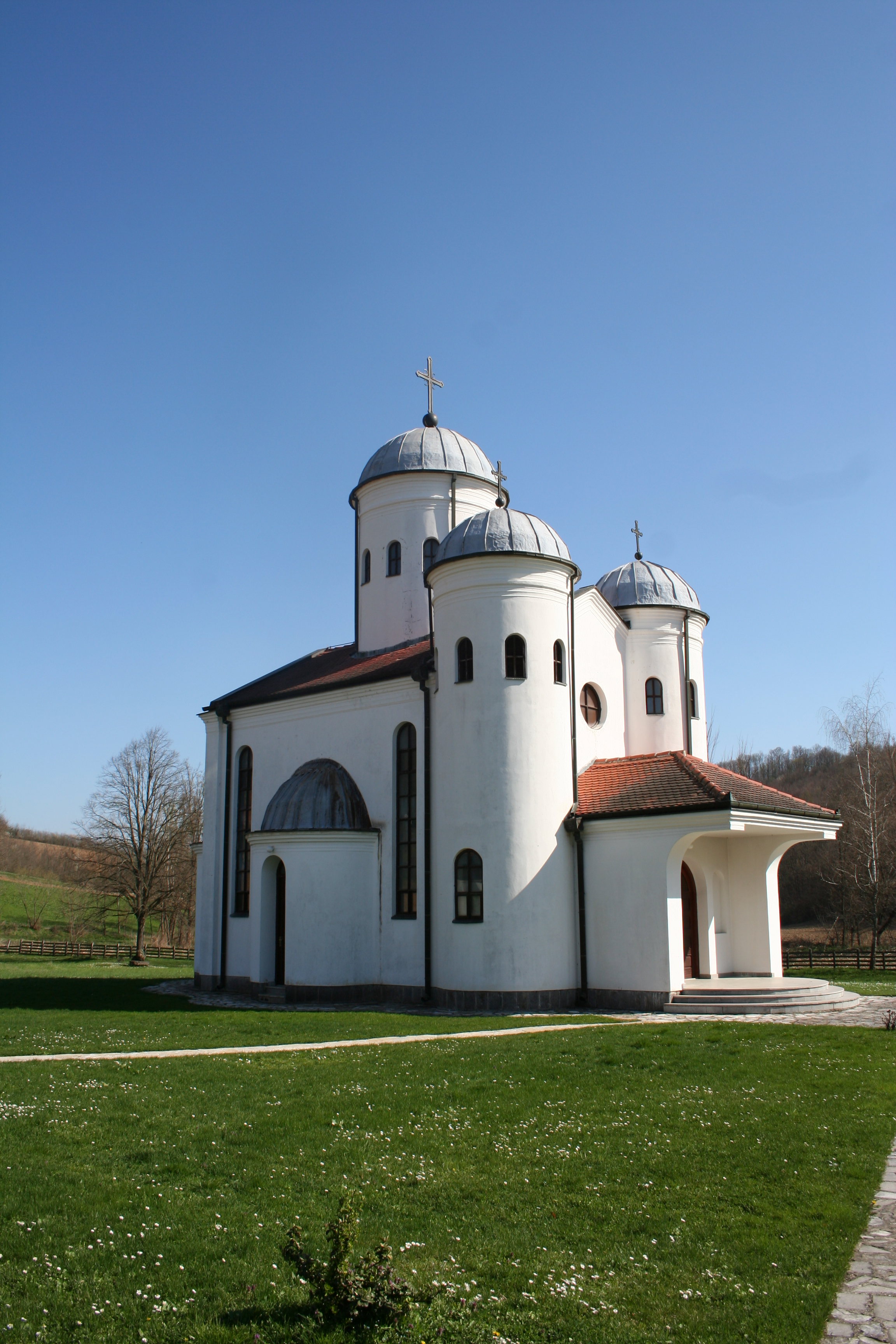 Crkva Sv. Apostola Luke, Babina Luka